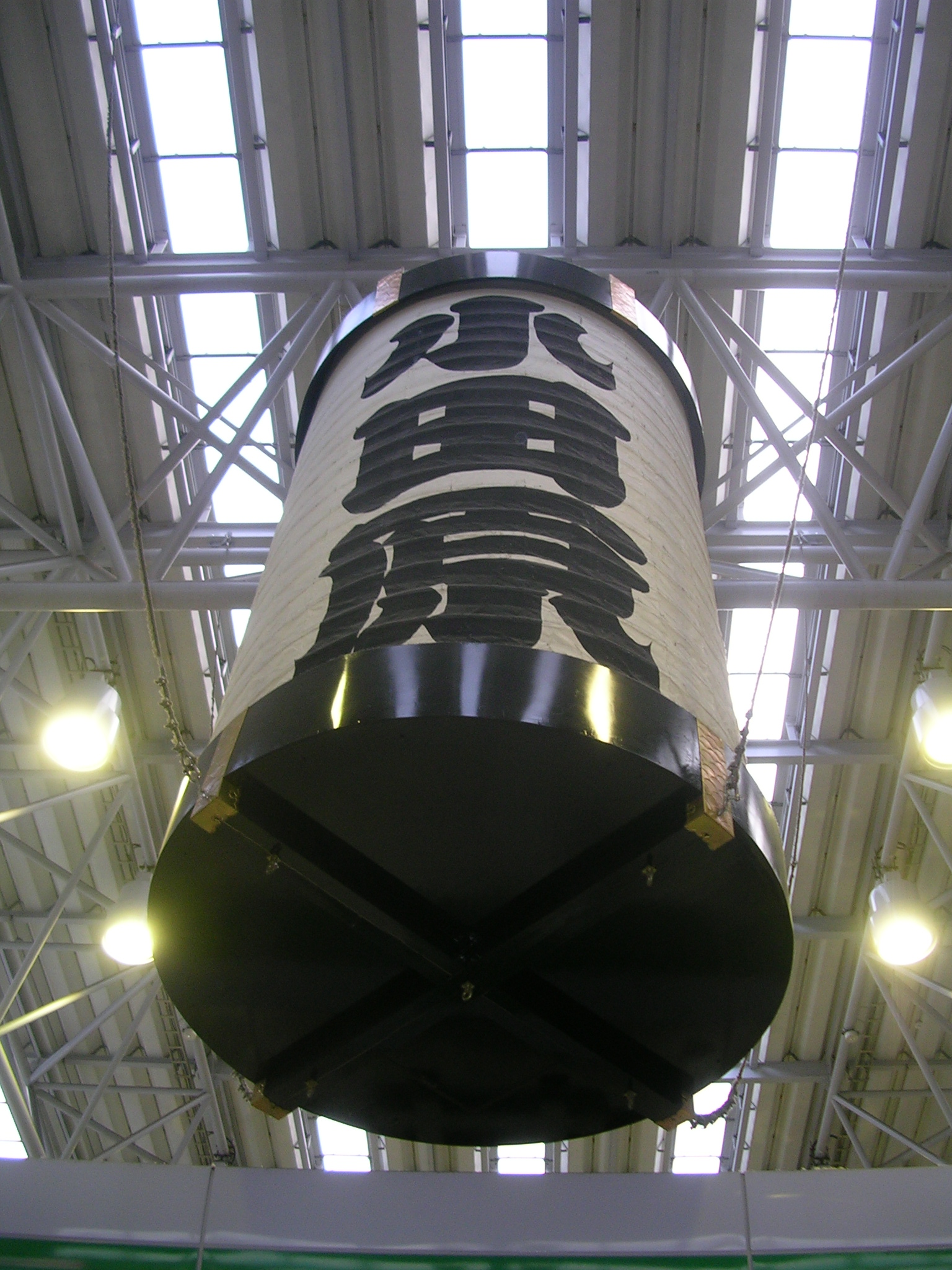 Odawara, Kanagawa, Japon.